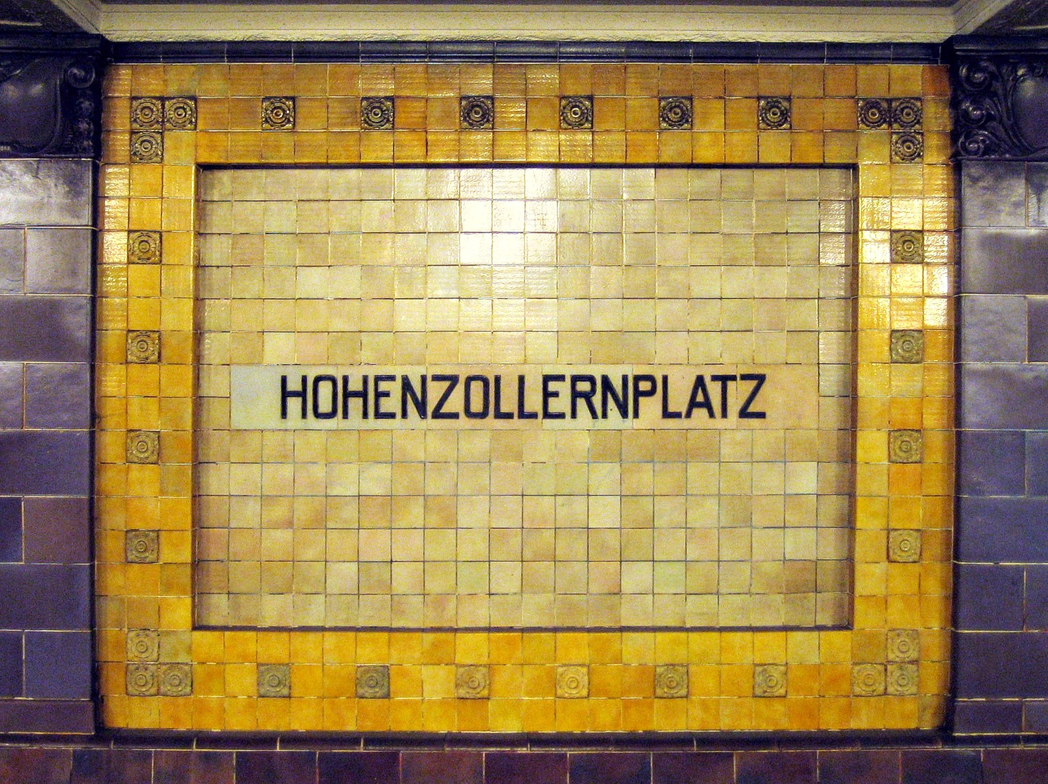 Berlin, U-Bahnhof Hohenzollernplatz, historisches Stationsschild